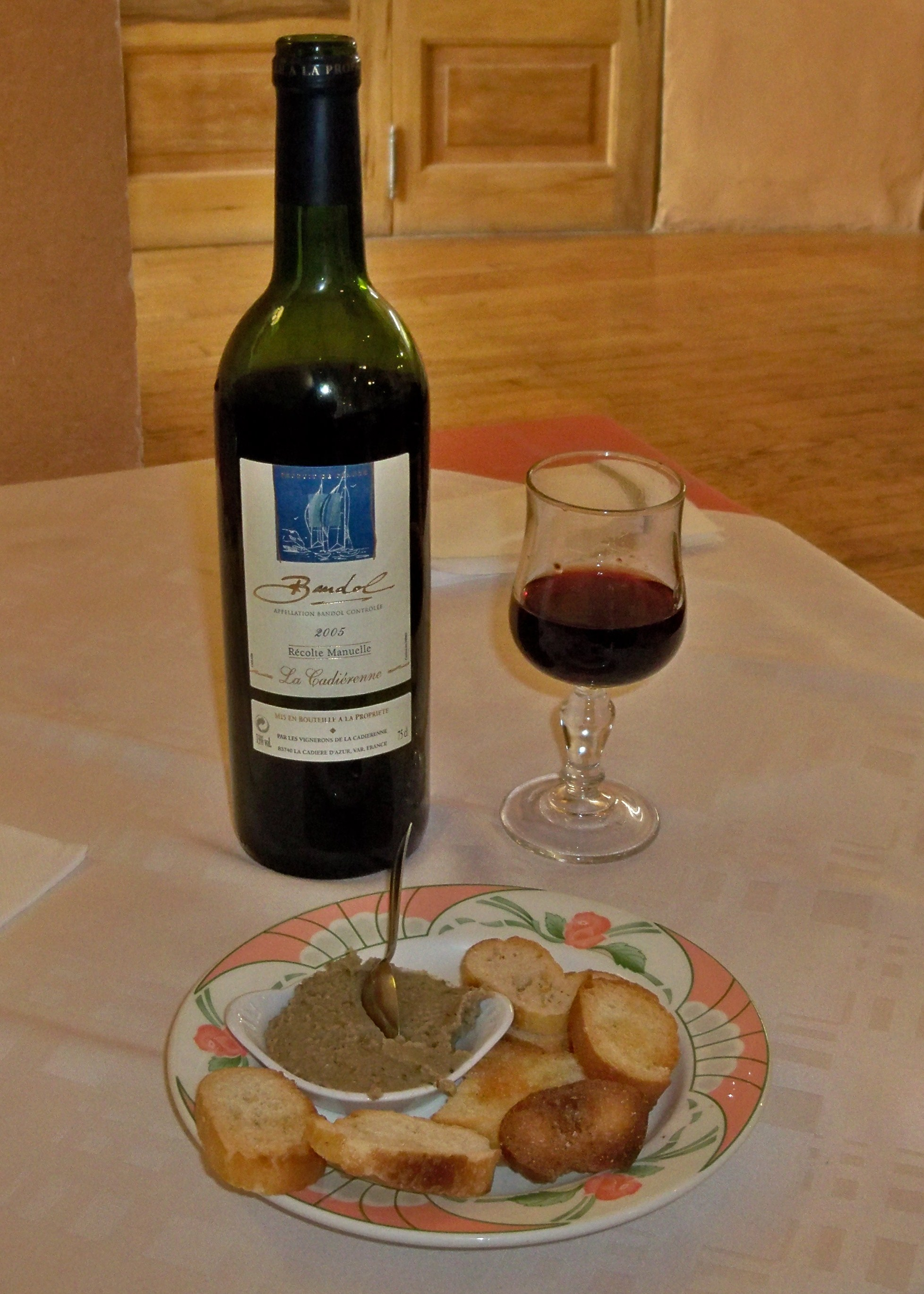 Bandol rouge 2005 et caviar d'aubergines